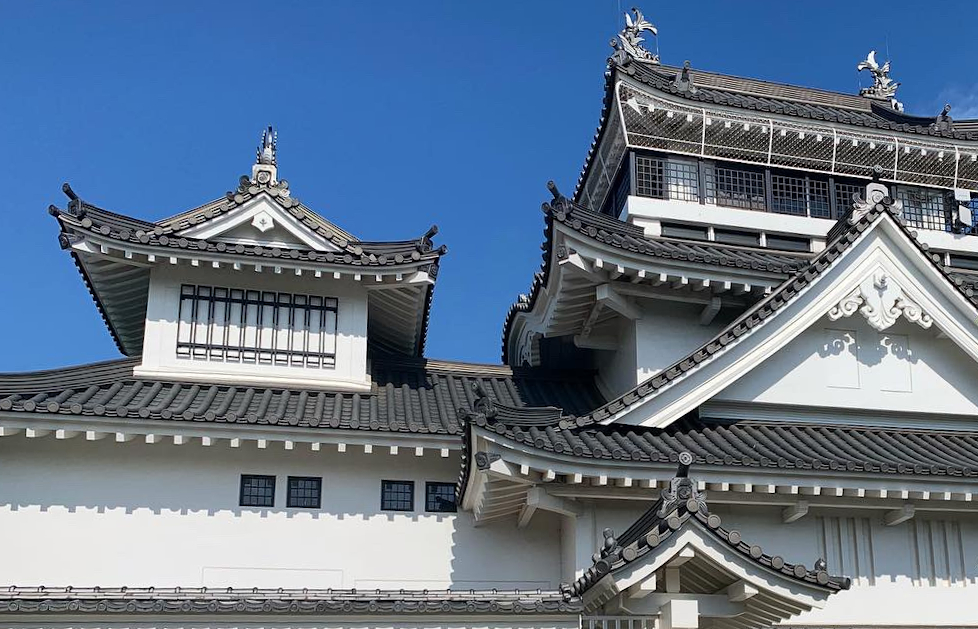 トリーデなると。[1] をトリムして屋根にフォーカスしたもの。溶融亜鉛めっきステンレス鋼板の瓦を使用(ステンレス協会. 第17回ステンレス協会賞 受賞作品 優秀賞. Retrieved on 2020-08-09.)。